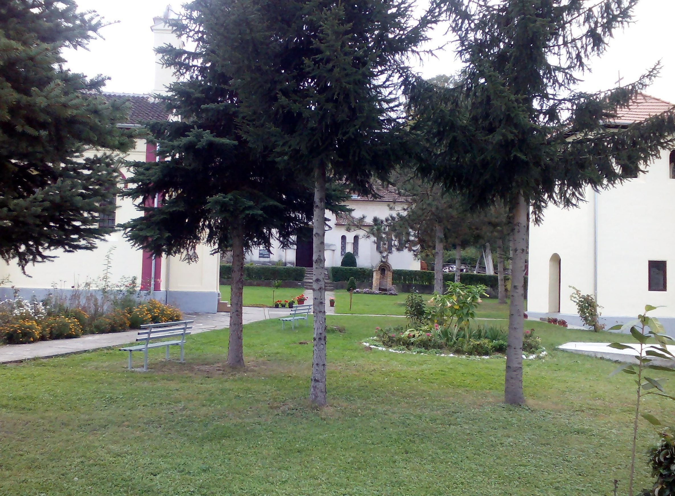 Део црквене порте у Багрдану са улазом у цркву, звонаром, чесмом и костурницом. Аутор слике Иван Миловановић.